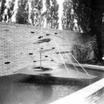 Bundesgartenschau 1957 in Köln - Springwasser